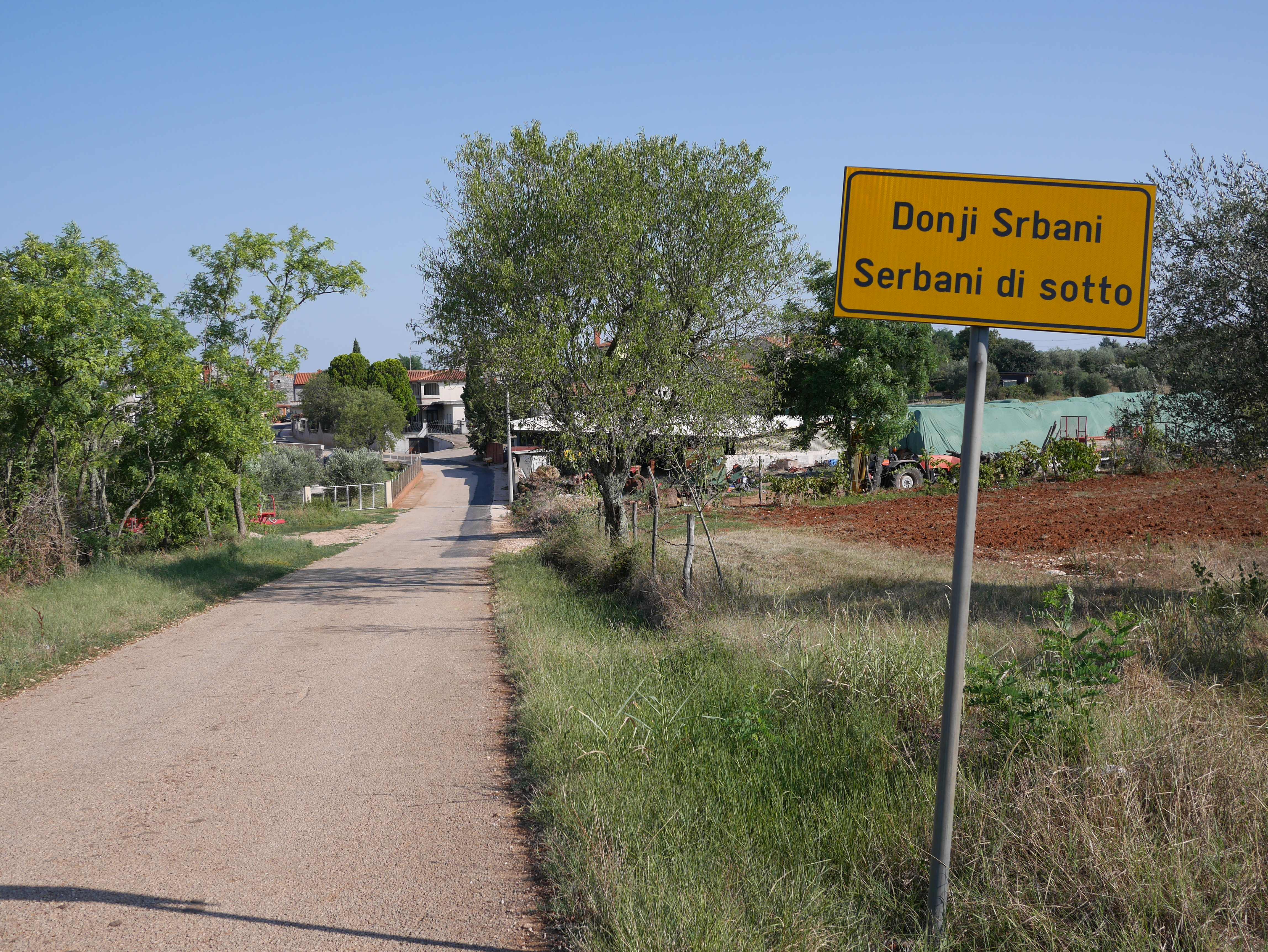 Donji Srbani (Istra)